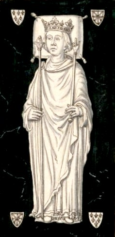 Philippe IV le Bel